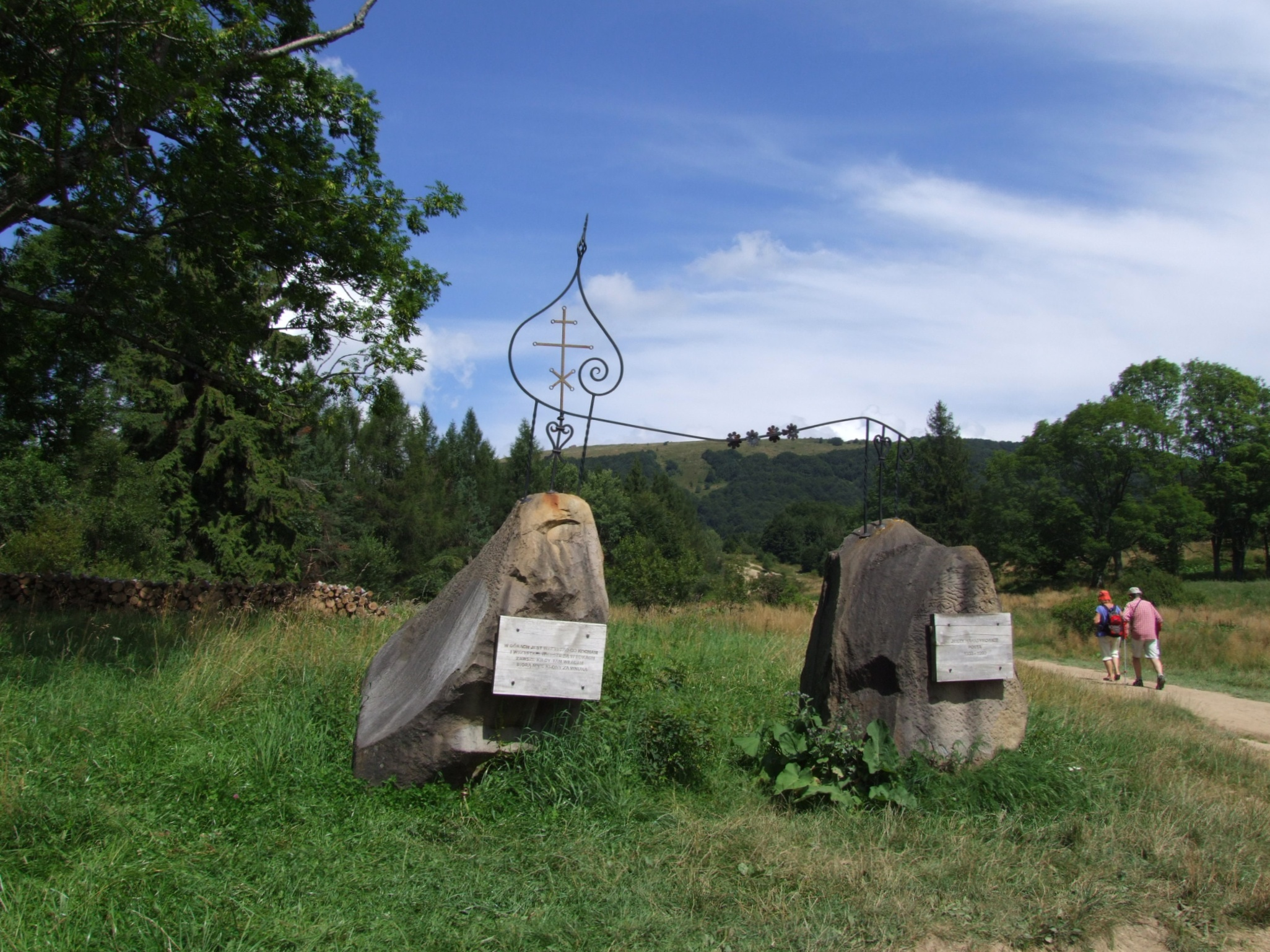 Pomnik na Wyżnej Przełęczy pod Połoniną Wetlińską w Bieszczadach